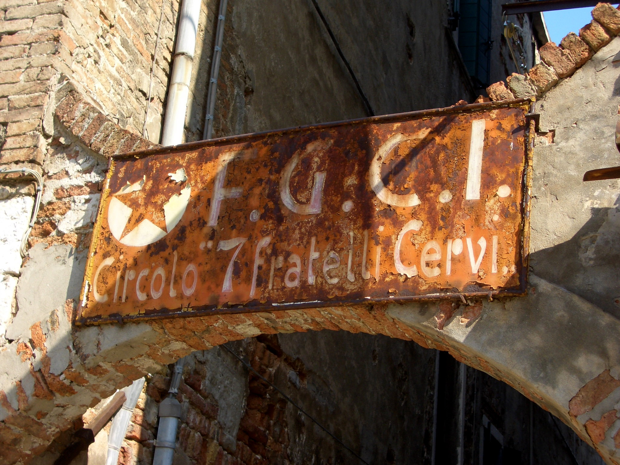 Venezia - FGCI